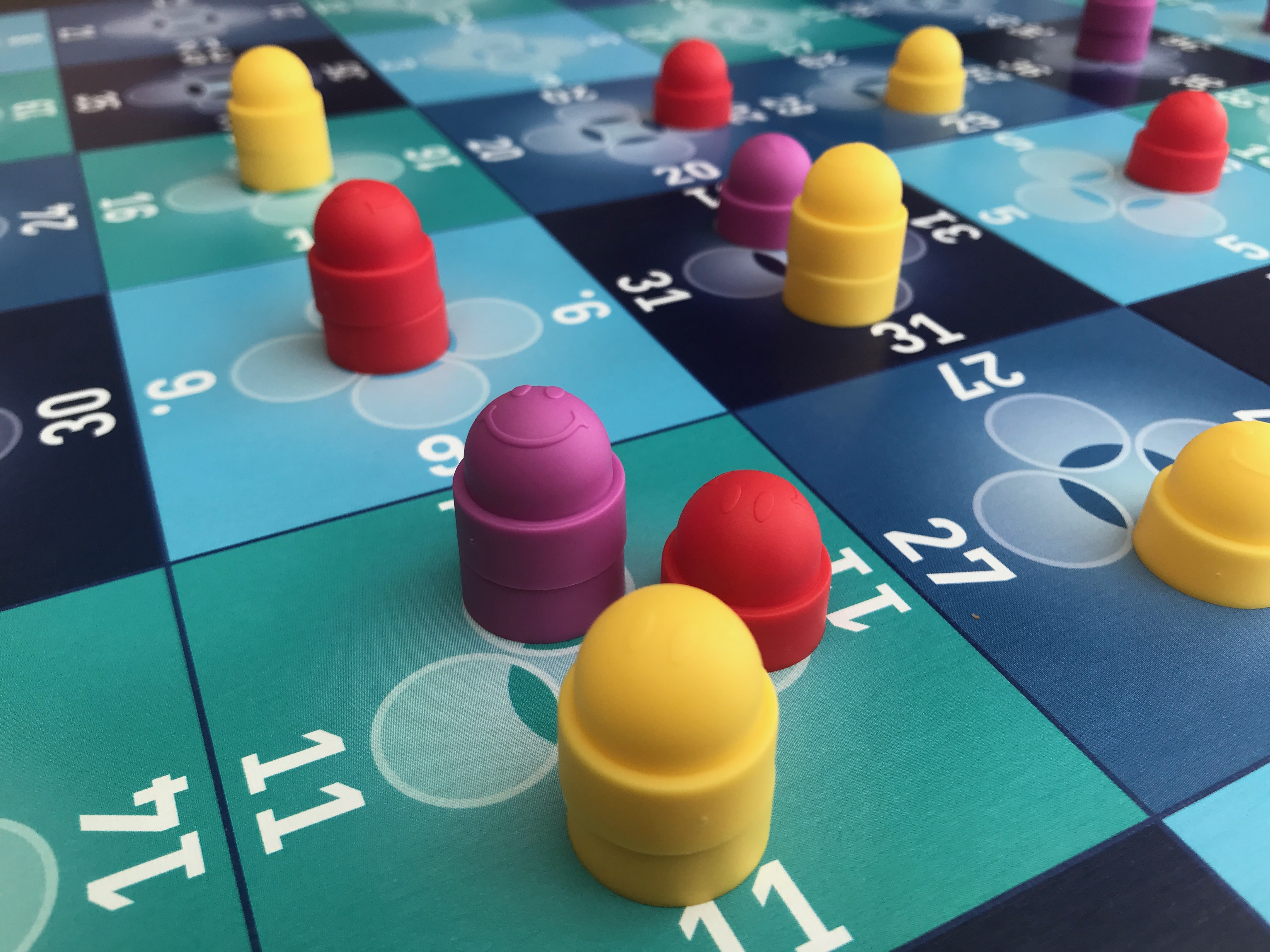 Spielmaterial für das Brettspiel Just 4 Fun